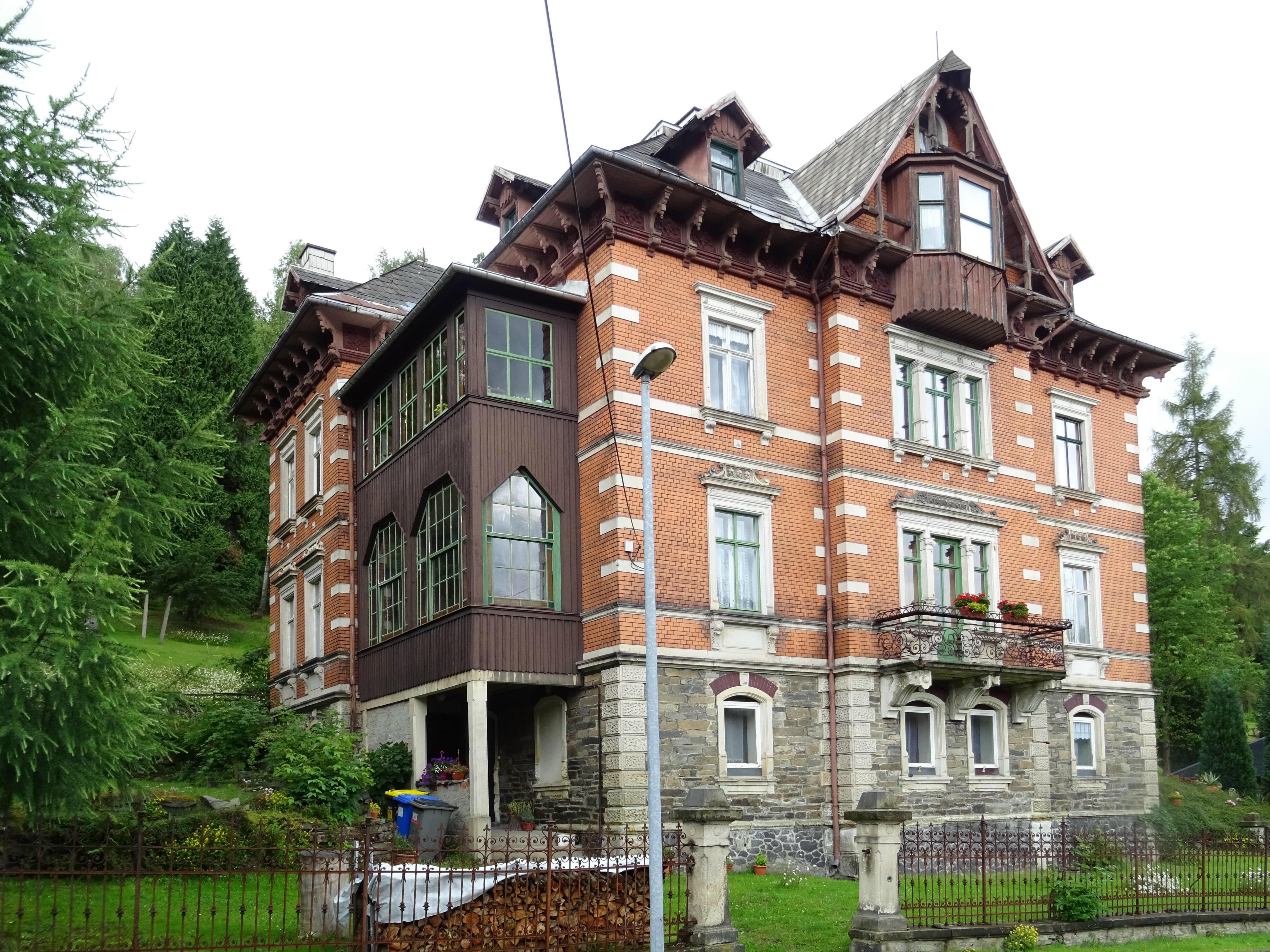 Niederschlag: Niederschlag10 an der B95